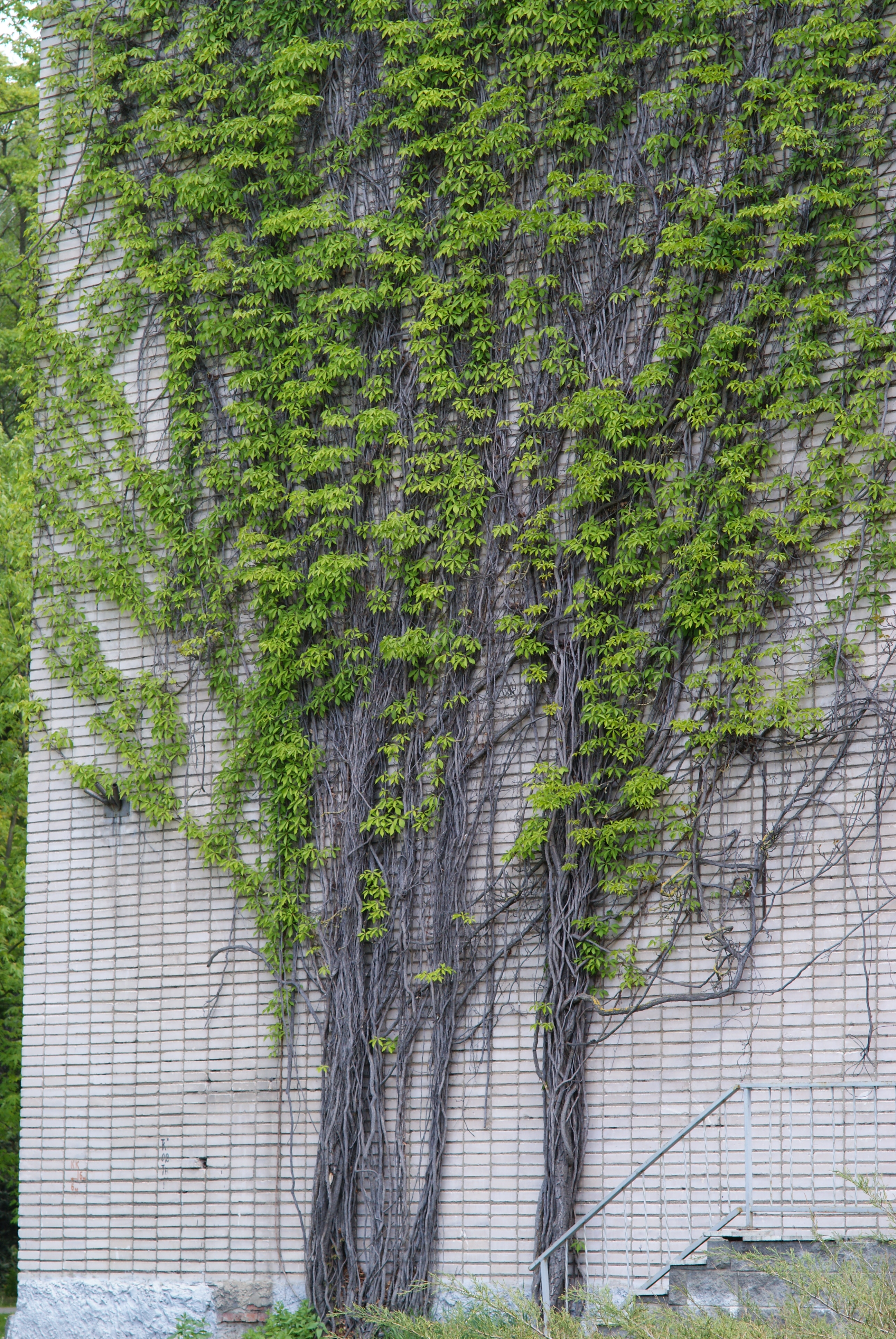 Сцяна, зацягнутая раслінай, Мінскі батанічны сад